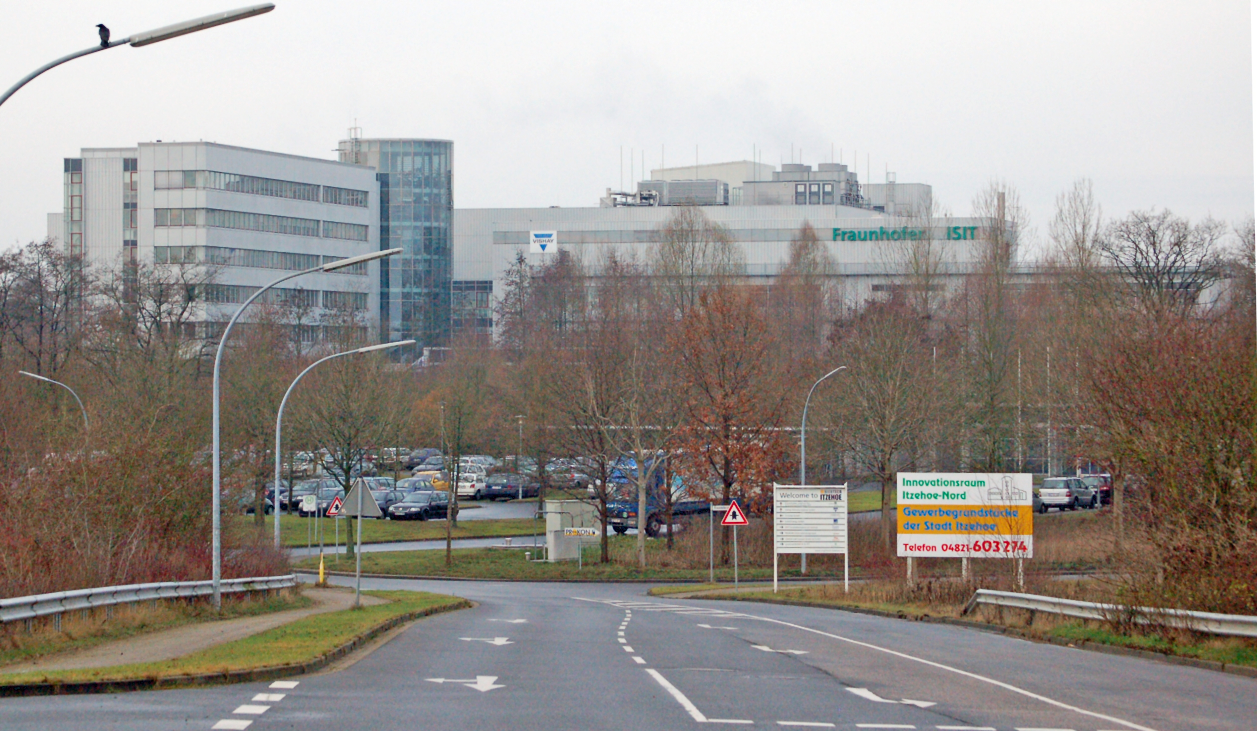 Das Hauptgebäude des Fraunhofer-Institut für Siliziumtechnologie ISIT in Itzehoe